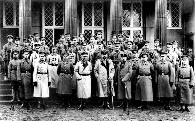 Herren des großen Hauptquartiers nach Verlegung desselben von Spa/Belgien nach Kassel-Wilhelmshöhe Nov. 1918